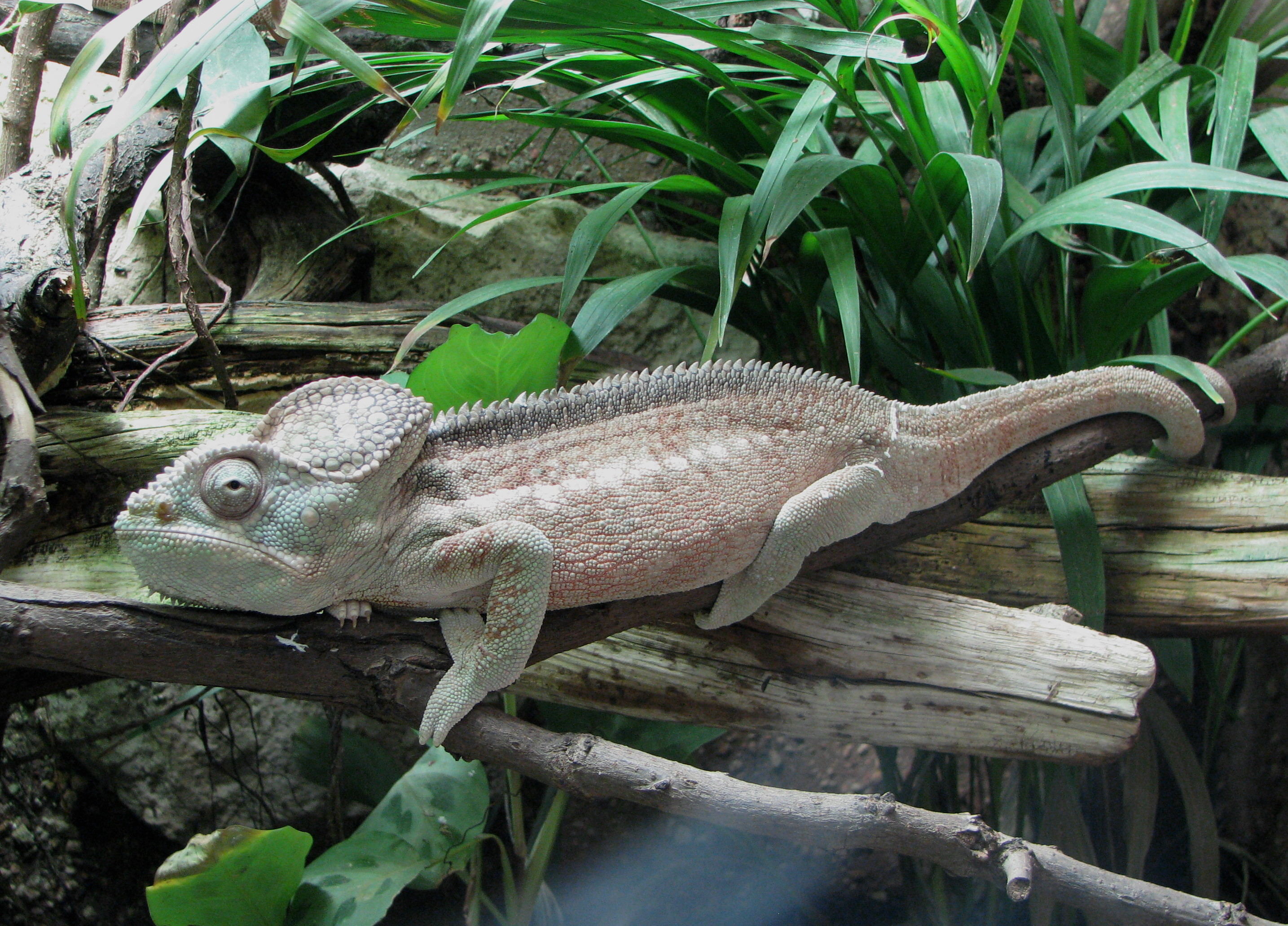 Riesenchamäleon Männchen (Furcifer oustaleti male)